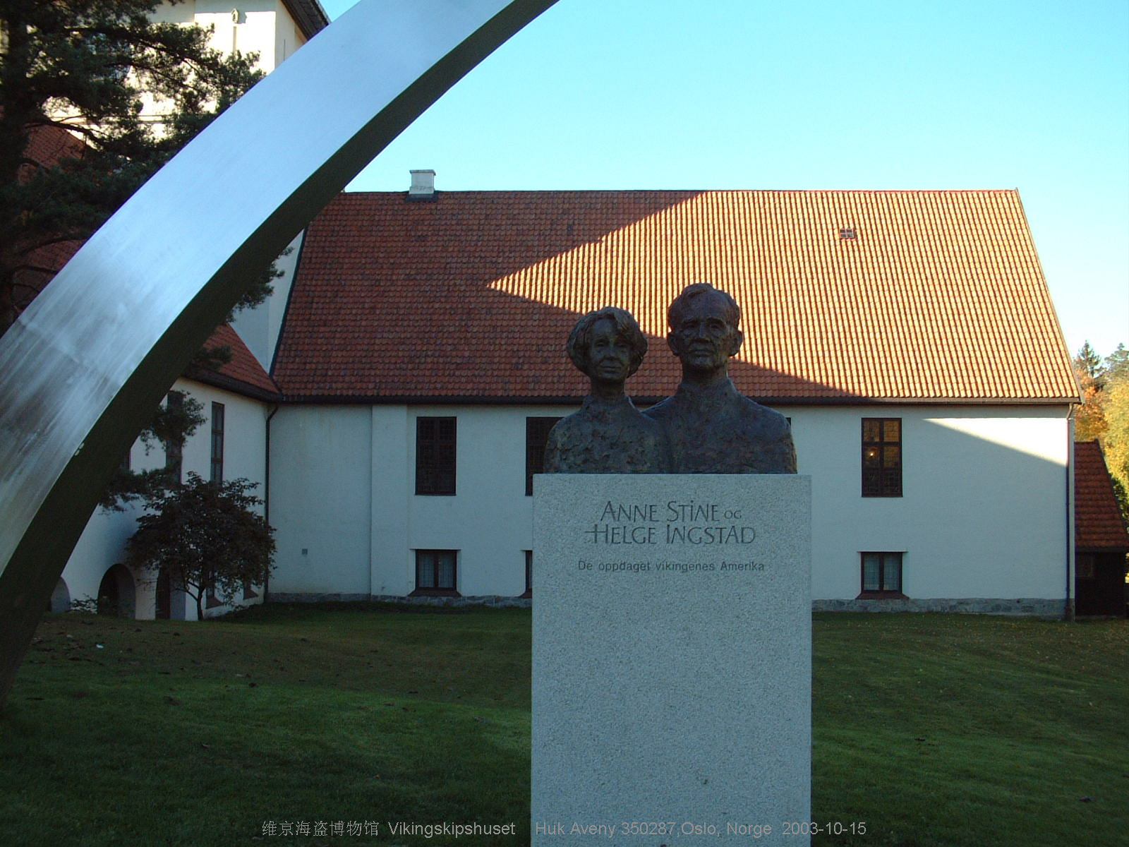 安妮•S•英格斯塔Anne Stine Ingstad (1918–1997)和她的丈夫 Helge Ingstad